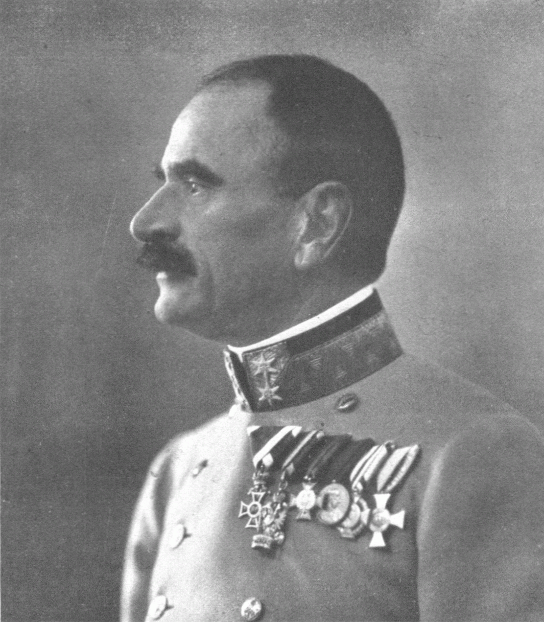 Károly Tersztyánszky (1854-1921), Hungarian general